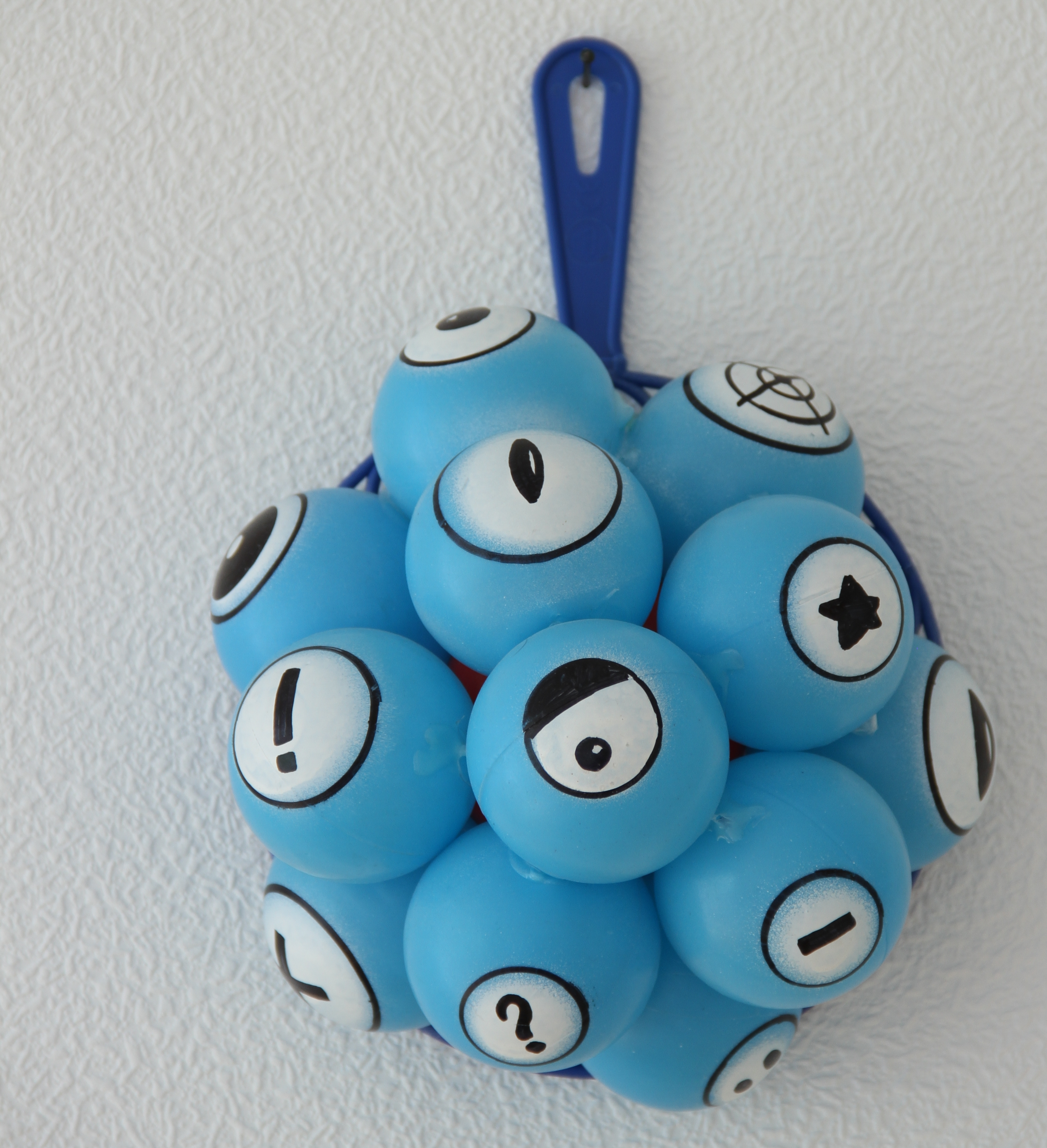 Ein "Augenhaufen" von Wolfgang Lehnerer "Z-ROK" (